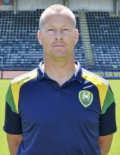 Arno van Zwam